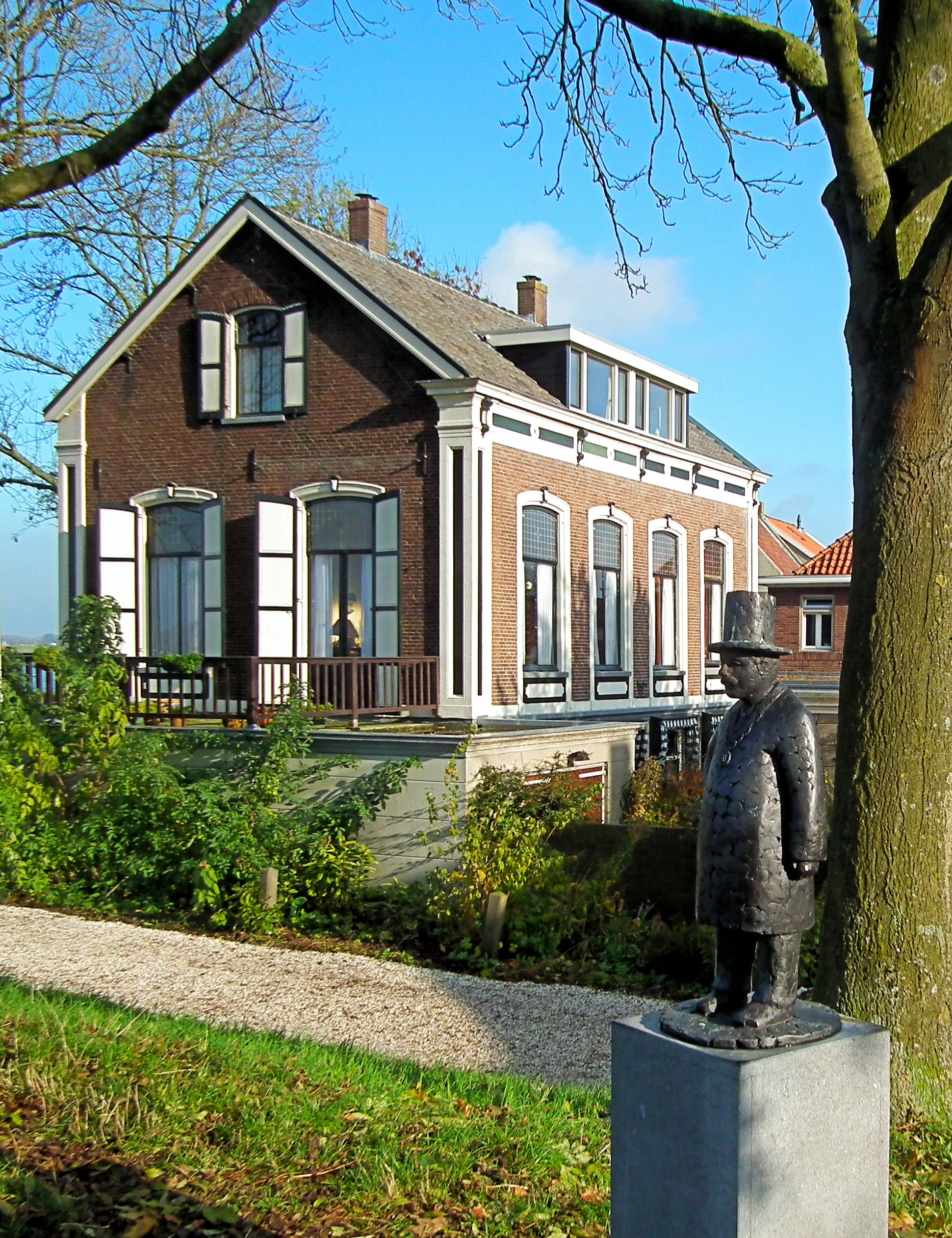 Woudrichem aan de Merwede, op de grens van Zuid-Holland, Noord-Brabant en Gelderland. Het huis van dokter Tinus (SBS6 tv-serie). Daarvoor een beeldje van Peer Verhagen, burgemeester van Woudrichem van 1903-1925